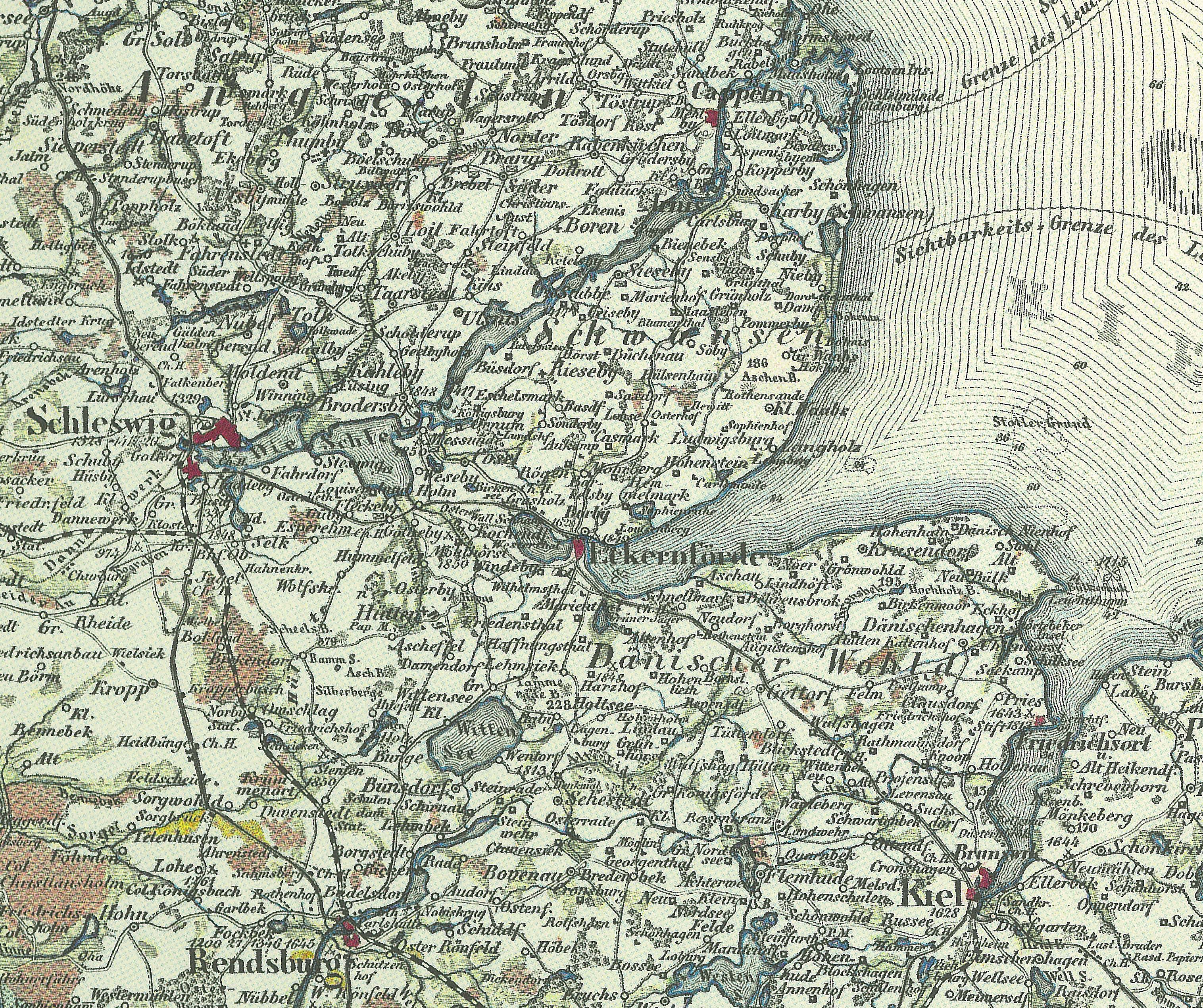 Karte von Schwansen und Dänischem Wohld mit Kappeln, Schleswig, Rendsburg und Kiel